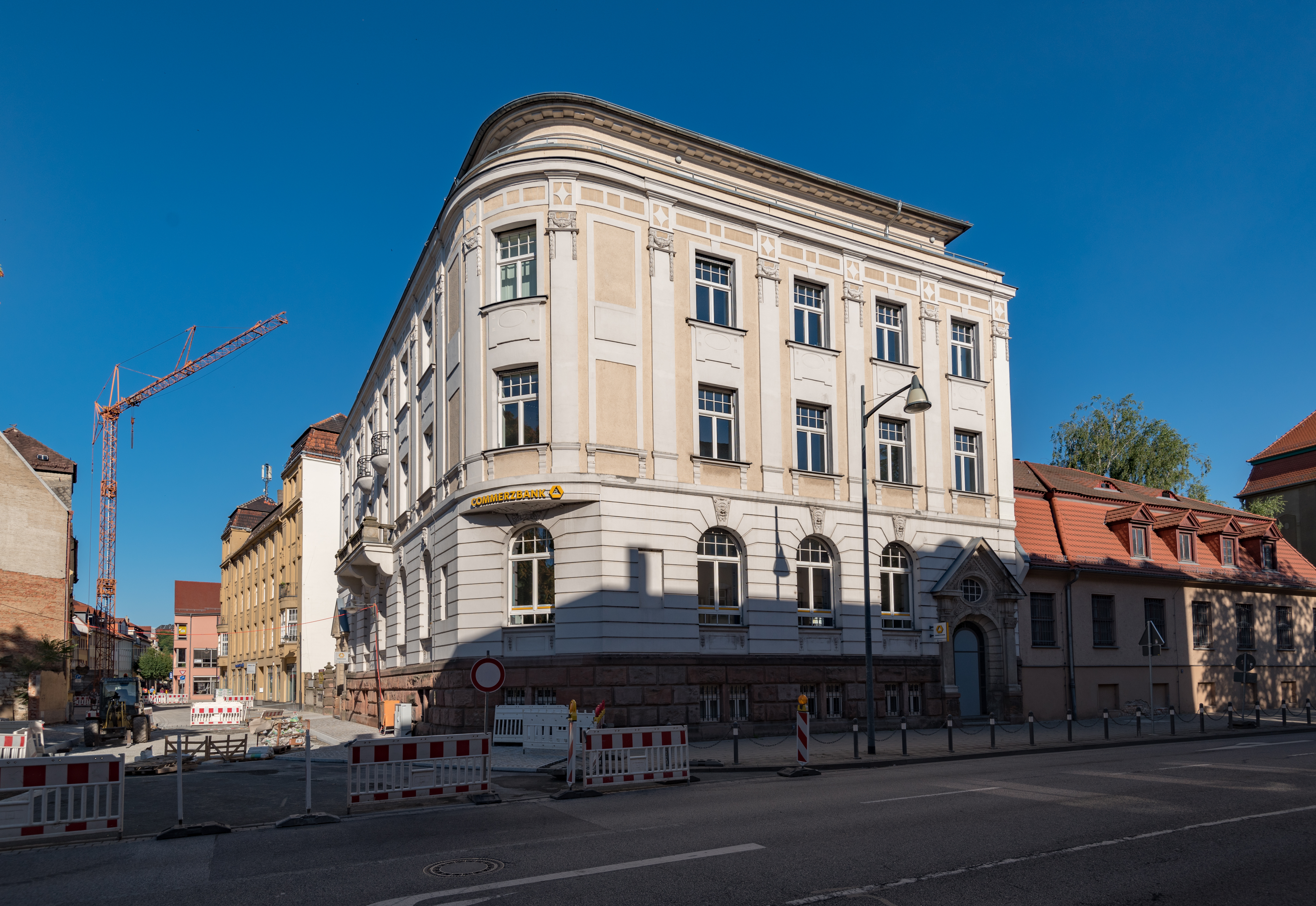 Weißenfels, Friedrichstraße 14